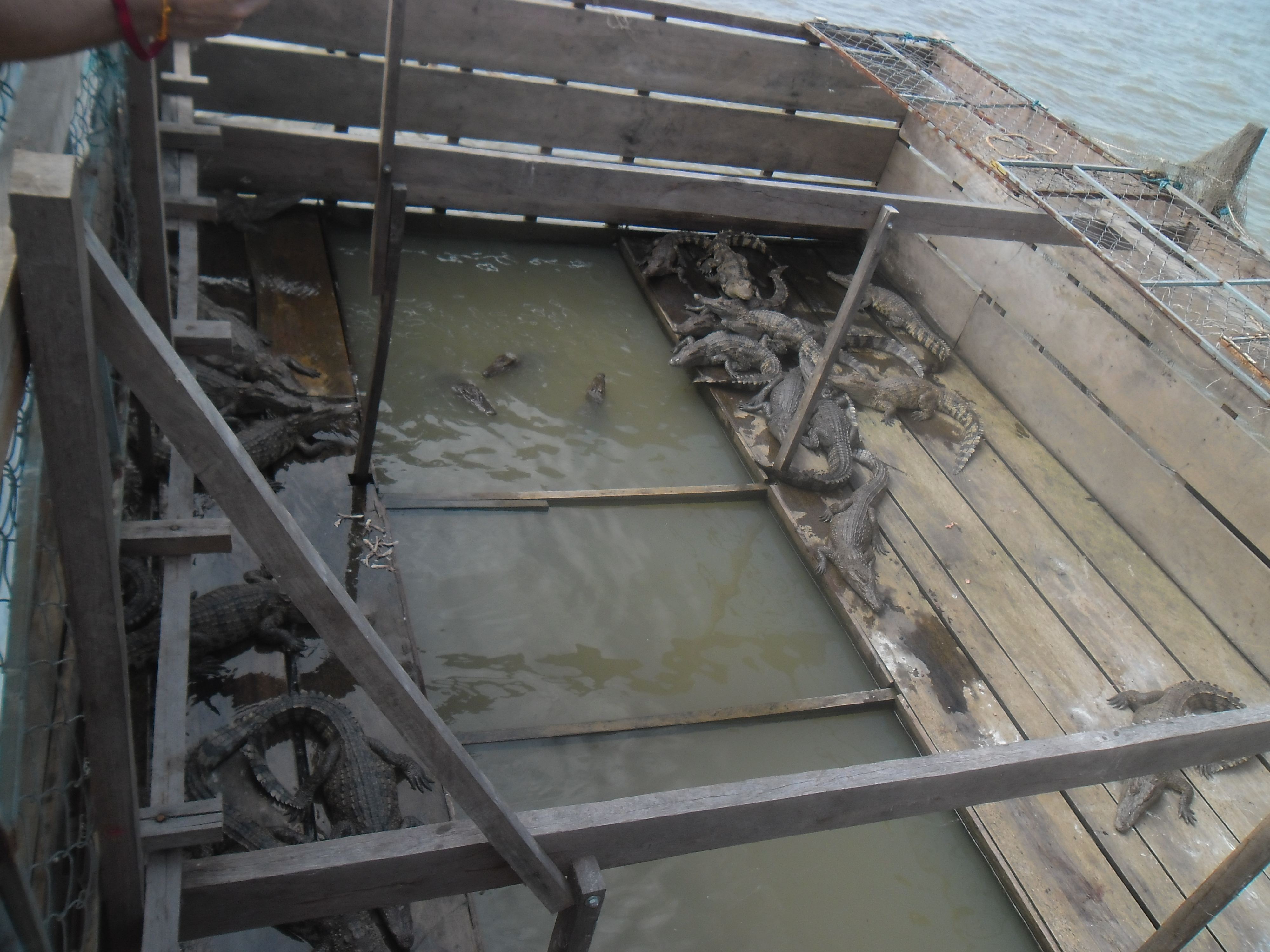 Tonle Sap